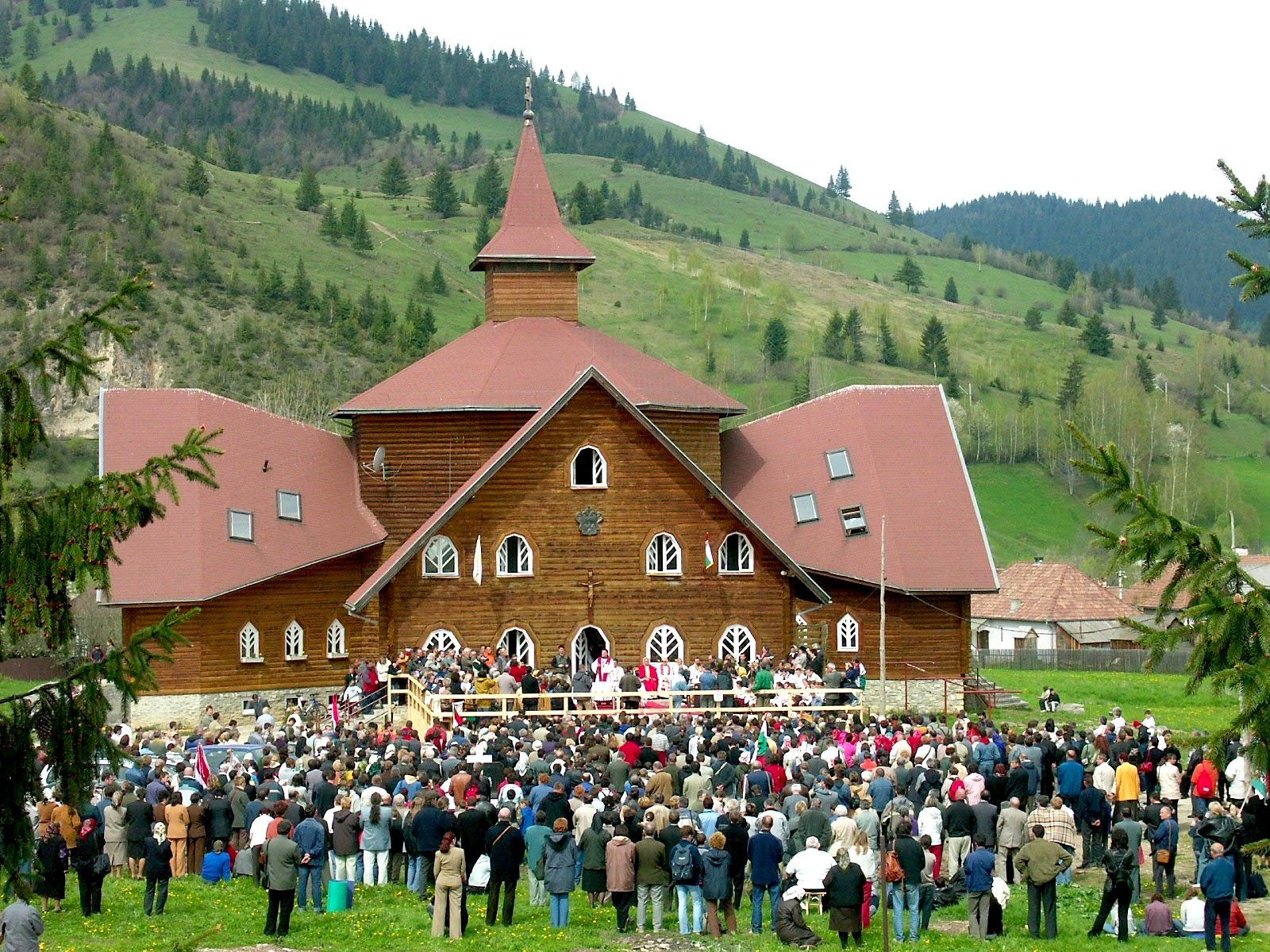 Gyímesfelsőlok, Árpádházi Szent Erzsébet IskolaRomână: Școala „Elisabeta de Turingia” a Arhidiecezei de Alba Iulia, Valea Ugra 644/A, Lunca de Sus, jud. Harghita